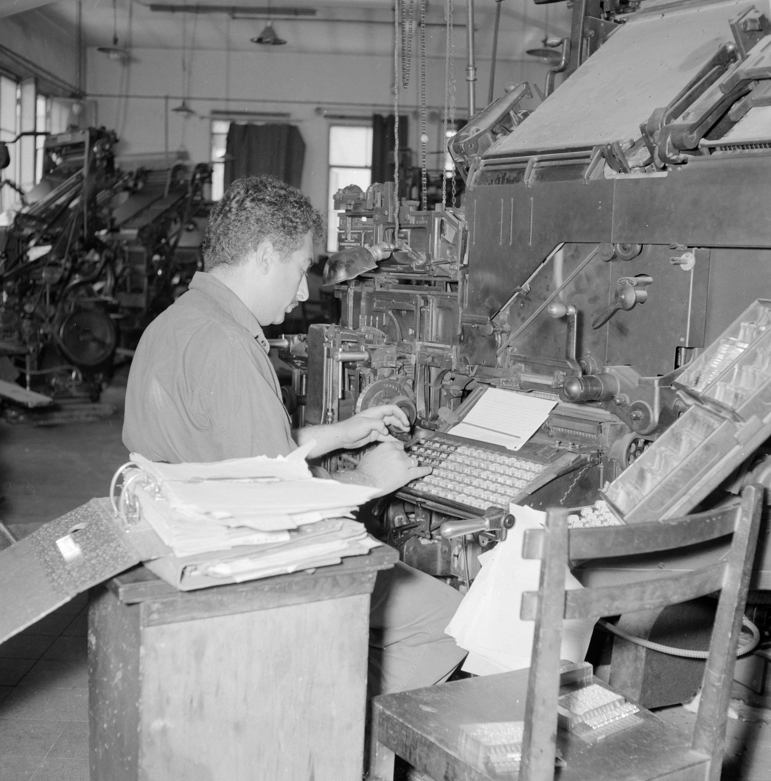 Collectie / Archief : Fotocollectie Van de Poll Reportage / Serie : Israël 1964-1965: Tel Aviv, drukkerij Dawar Beschrijving : Tel Aviv. Typograaf aan het werk achter een linotype zetmachine in de drukkerij waar het dagblad Dawar (Davar) wordt gedrukt Annotatie : De Linotype is een regelzet machine waarin de functies van zetten en gieten verenigd zijn. De machine werd door een Duitse immigrant ontwikkeld in de VS en vanaf 1886 geproduceerd Datum : 1964 Locatie : Israël, Tel Aviv Trefwoorden : arbeiders, drukkerijen, kranten, machines, typografen, werkplaatsen Fotograaf : Poll, Willem van de, [onbekend] Auteursrechthebbende : Nationaal Archief Materiaalsoort : Negatief (zwart/wit) Nummer archiefinventaris : bekijk toegang 2.24.14.02 Bestanddeelnummer : 255-1877